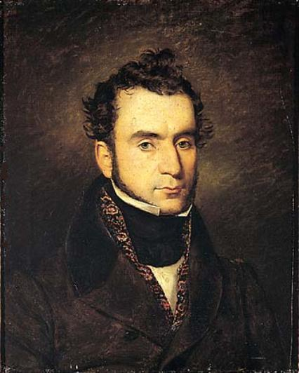 Ritratto di Giovanni Rossi, olio su tela di Enrico Bandini (1807-1888). Presso Museo Glauco Lombardi, Parma.